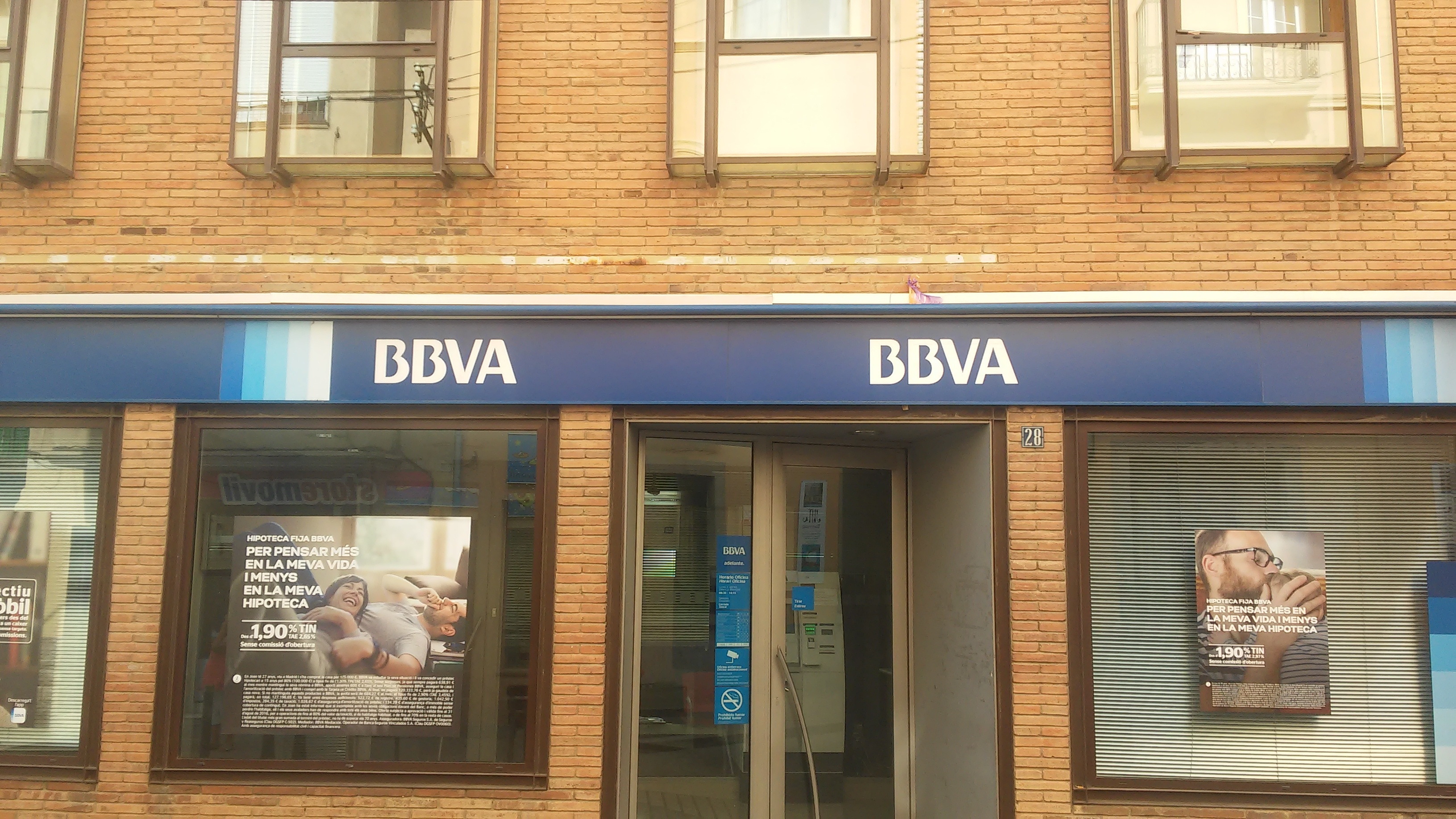 Oficina del BBVA a Tarragona